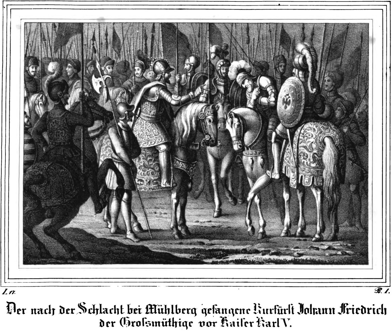 Saxonia Museum für saechsische Vaterlandskunde. Band 1. Dresden: Pietzsch und Comp. Siehe File:Saxonia Museum für saechsische Vaterlandskunde I.djvu